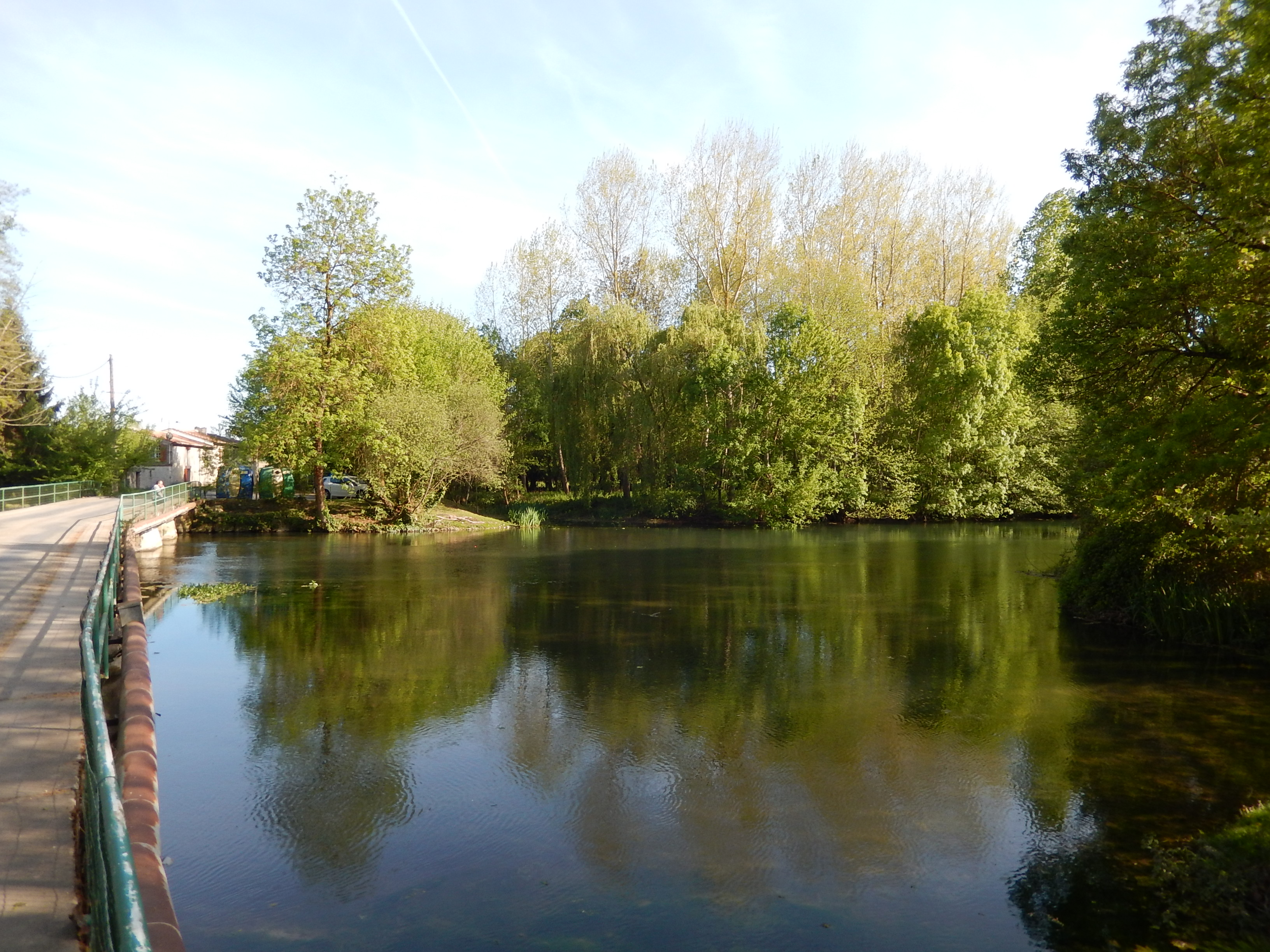 La Boutonne, un soir de printemps, à Saint-Séverin-sur-Boutonne (Charente-Maritime, France).